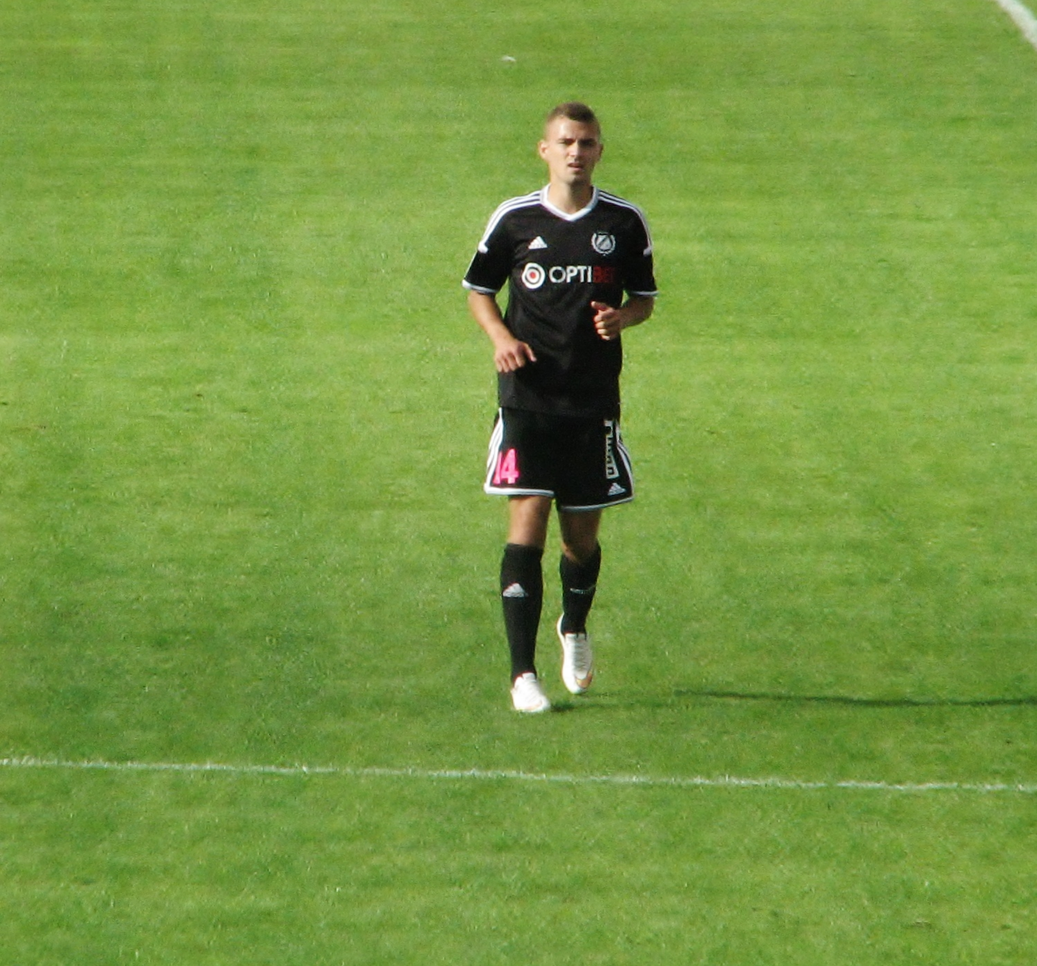 Ken Kallaste mängimas FC Flora vastu